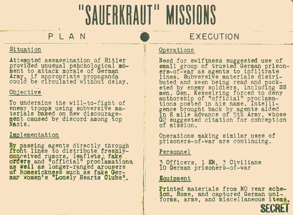 Unterlagen des OSS für die Operation Sauerkraut.